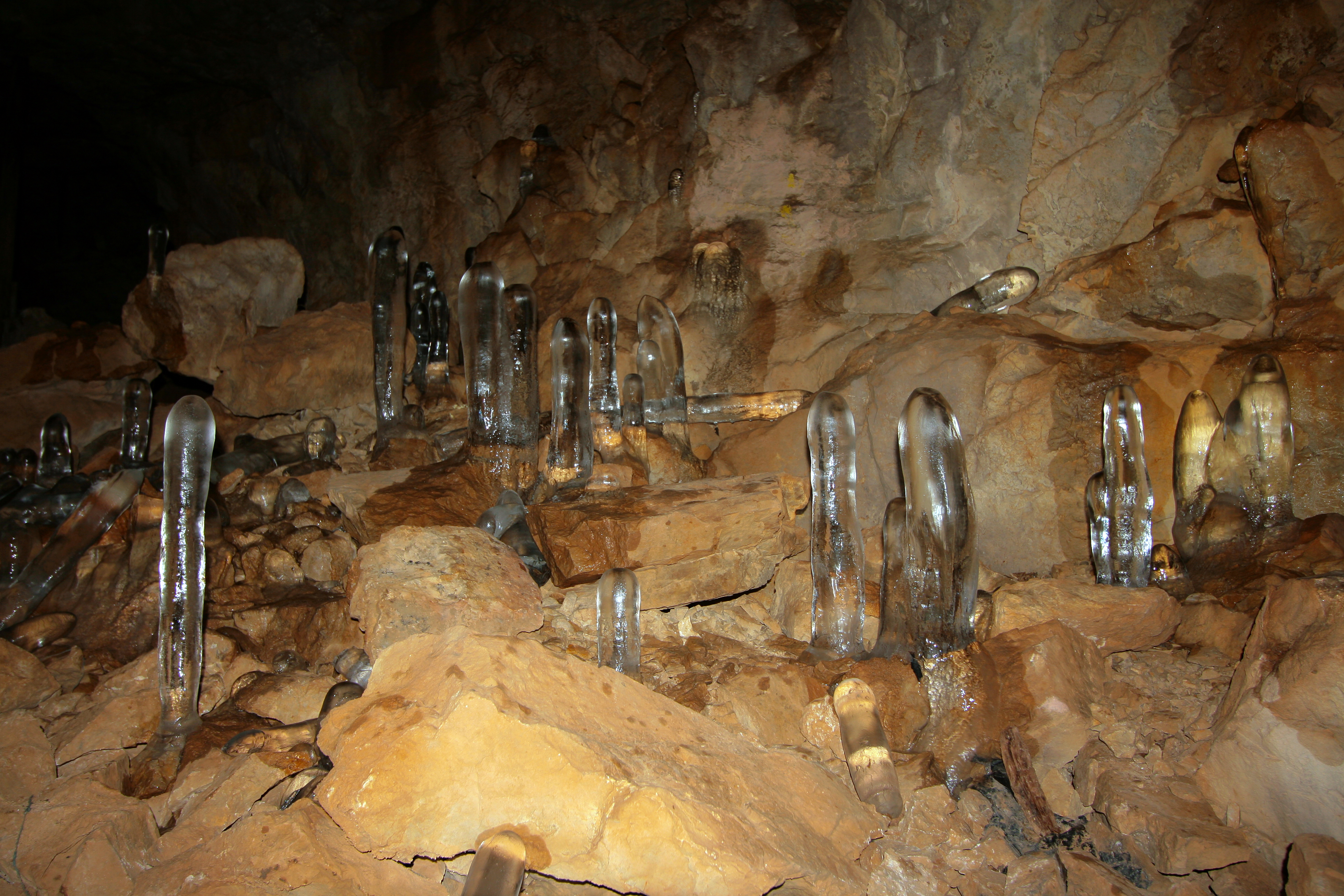 غار یخ مراد در حوالی روستای آزادبر و روستای کهنه ده در منطقه گچسر و جاده چالوس می‌باشد. این غار در محدوده استان البرز و از جاذبه‌های طبیعی استان البرز می‌باشد. دریچهٔ ورودی این غار در ارتفاعات کوه‌های منطقه واقع شده‌است و مسیر غار عموماً شیب دار و رو به پایین می‌باشد که نهایتاً با رسیدن به اعماق کوه، با چشمه‌های یخ زده در کف زمین و استالاکتیت‌های اسفنجی غار مواجه می‌شوید. ارتفاع این غار از سطح دریا در حدود ۲۶۴۰ متر می‌باشد و دهانهٔ این غار سه متر پهنا و هشت متر ارتفاع دارد. در ماه‌های اسفند و فروردین، قندیل‌های بسیار زیبای غار در بهترین وضعیت به سر می‌برند. نکتهٔ قابل توجه این غار مطبق بودن آن می‌باشد که در میان غارهای ایران کمتر دیده می‌شود. در بخشی از غار چهار طبقه با اختلاف ارتفاع بیش از ۳۰ متر دیده می‌شوند. مجید کاشیان غار نورد حرفه‌ای باشگاه دماوند و ترسیم‌کننده نقشه غار در توضیحات این غار آورده‌است: «در گذشته مردم بومی بر این باور بوده‌اند که یخ موجود در اعماق غار برای درمان ناباروری زنان خاصیت شفادهنده دارد؛ و وجود کهنه‌های آویخته (دخیل) به دهانه اصلی و درون غار در گذشته که باعث نام‌گذاری روستای مجاور به کهنه ده شده گواه این ادعا است».